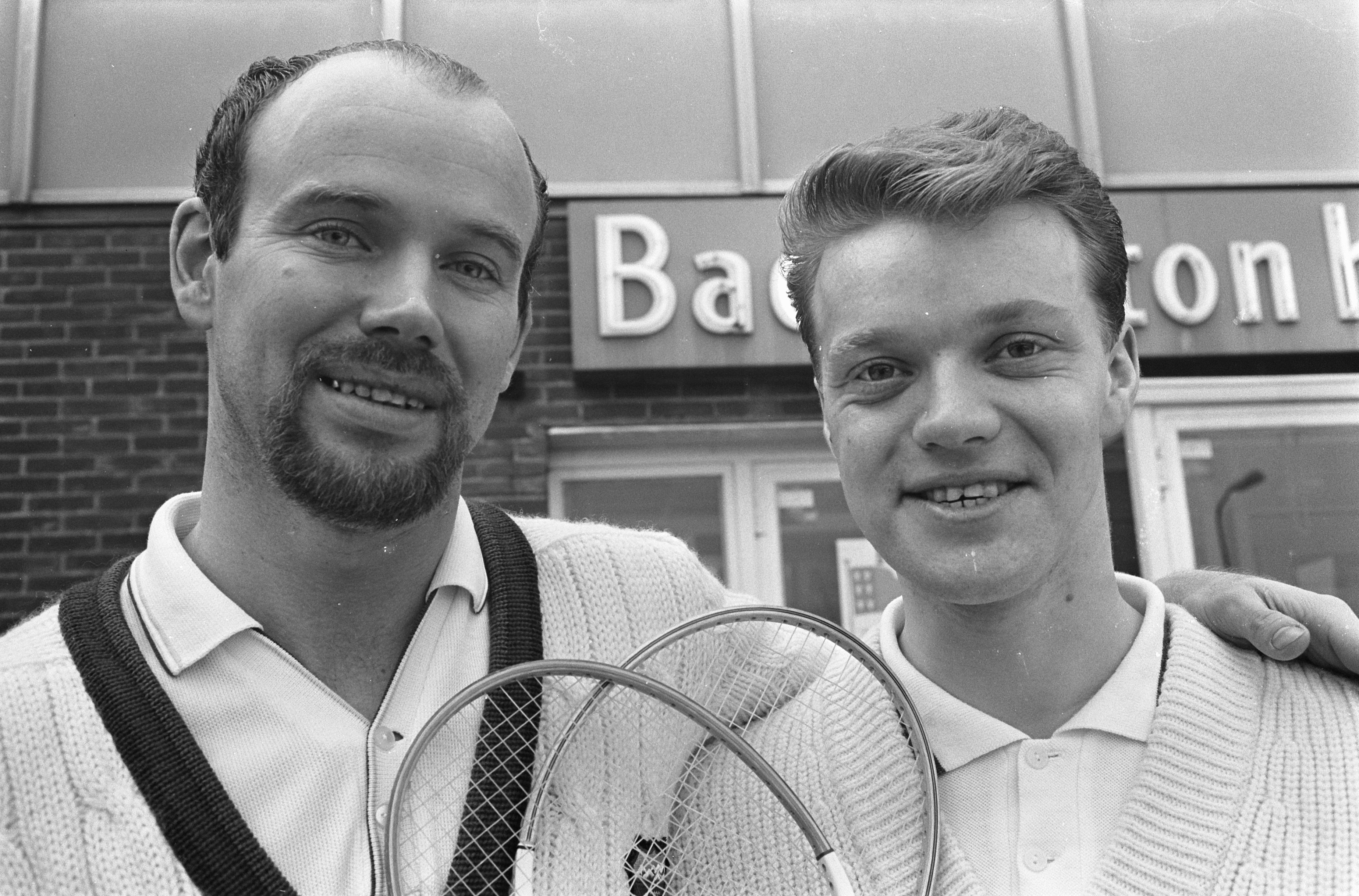 Collectie / Archief : Fotocollectie Anefo Reportage / Serie : [ onbekend ] Beschrijving : Badminton, Internationale kampioenschappen te Haarlem, Deense herendubbel Kops (l) en Bacher Datum : 10 februari 1968 Locatie : Haarlem Trefwoorden : BADMINTON, KAMPIOENSCHAPPEN Fotograaf : Koch, Eric / Anefo Auteursrechthebbende : Nationaal Archief Materiaalsoort : Negatief (zwart/wit) Nummer archiefinventaris : bekijk toegang 2.24.01.05 Bestanddeelnummer : 921-0632